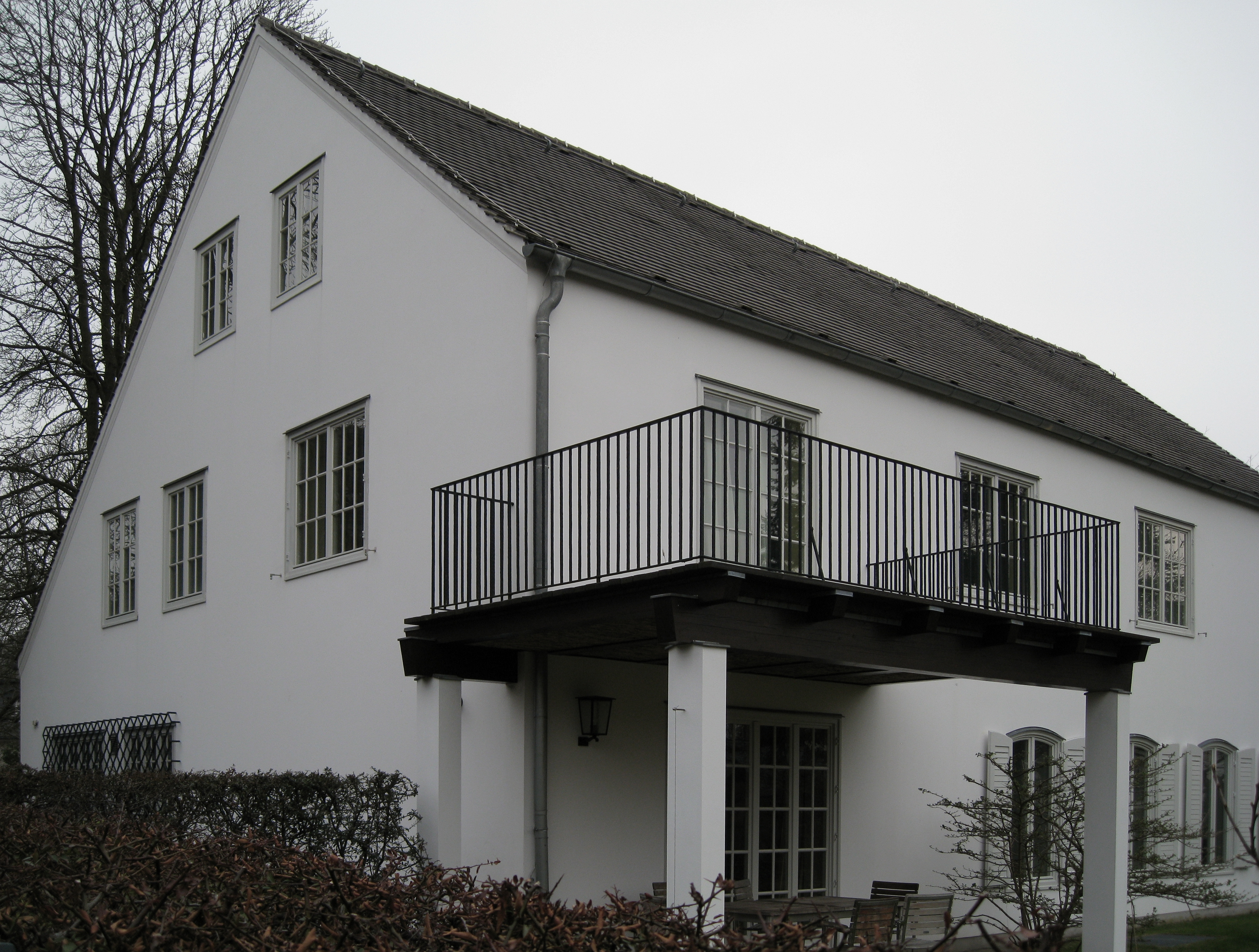 Wohnhaus